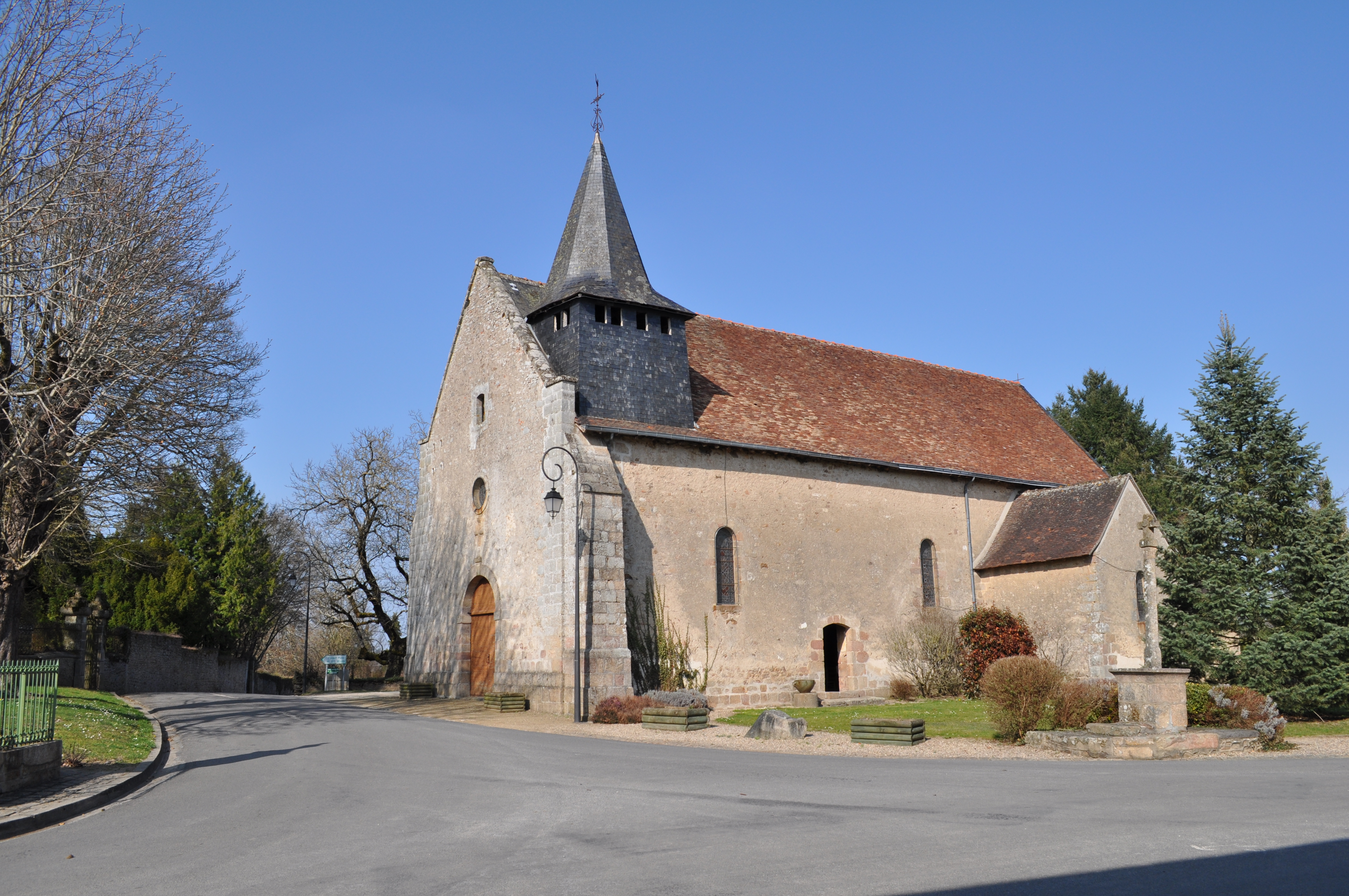 L'église Saint-Martin de Fromental